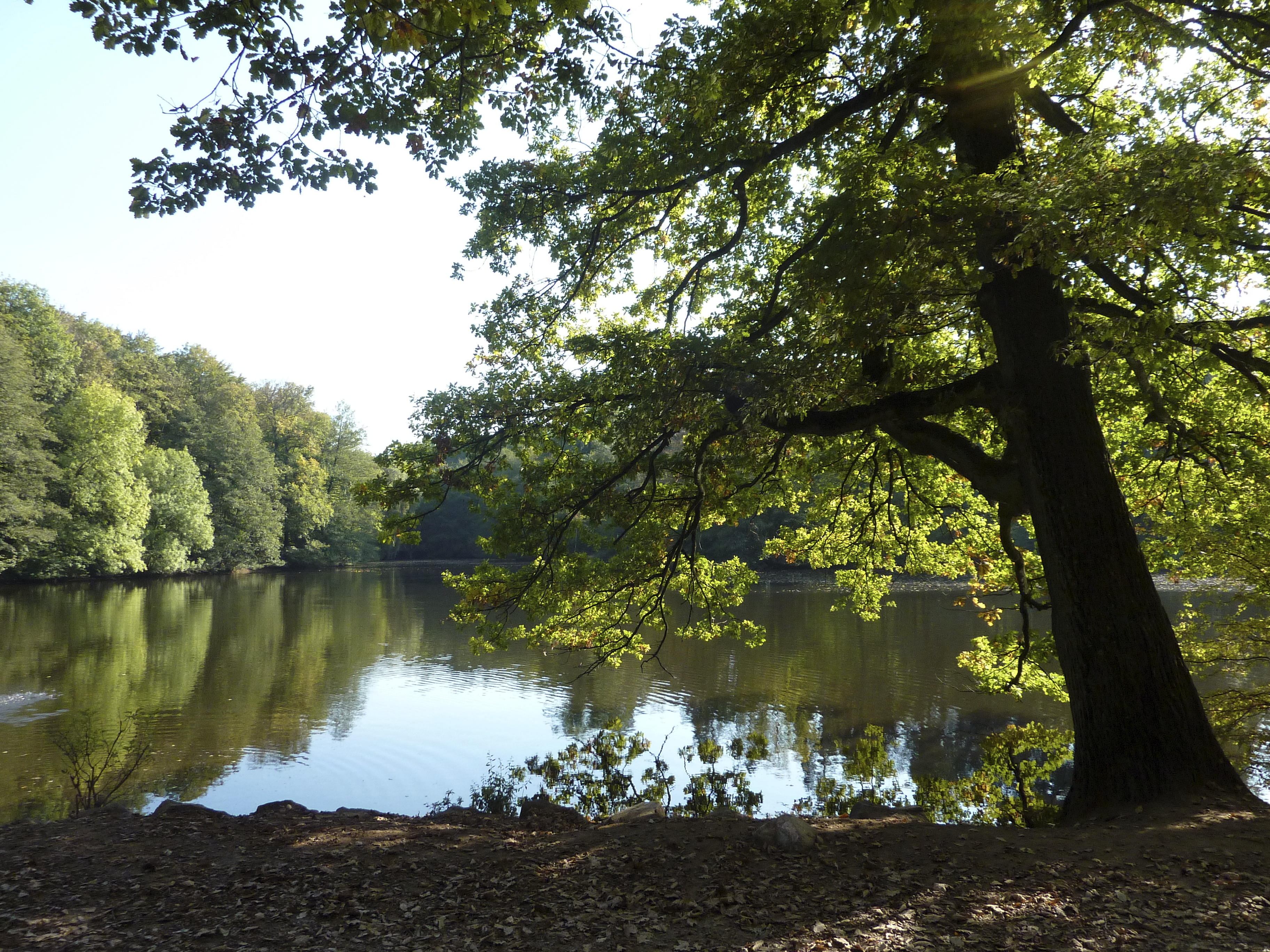 Frankfurt am Main, Stadtwald: Der Jacobiweiher auf dem Gebiet des Stadtteils Sachsenhausen wurde 1932 als Hochwasser-Rückhaltebecken angelegt. Mit einer Wasserfläche von sechs Hektar ist er Frankfurts größtes Stillgewässer. Blick vom Ufer auf den Teich aus nordöstlicher Richtung. Im Vordergrund eine direkt am Ufer stehende Eiche.